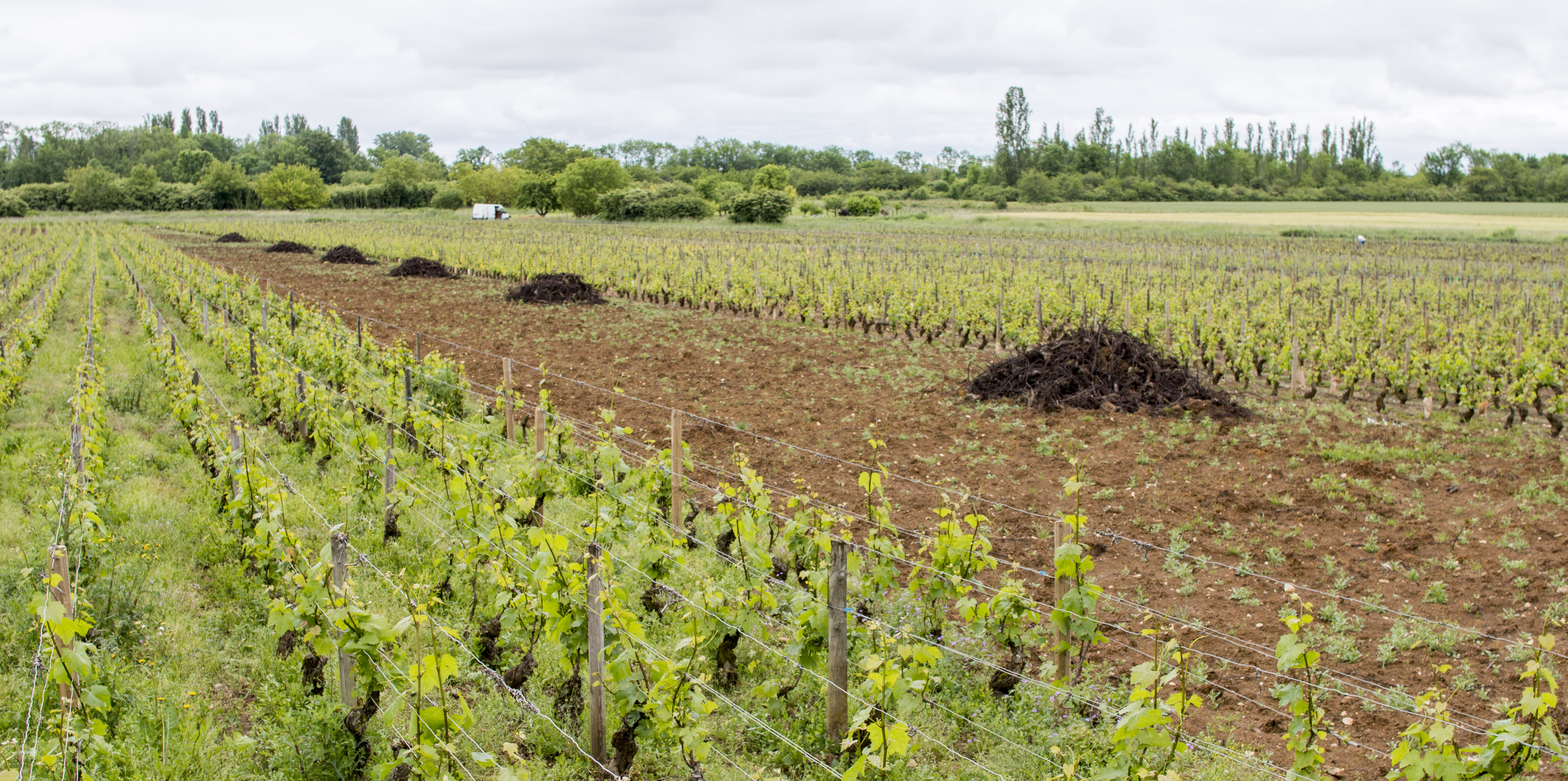 Arrachage d'une parcelle de vigne, Bourgogne